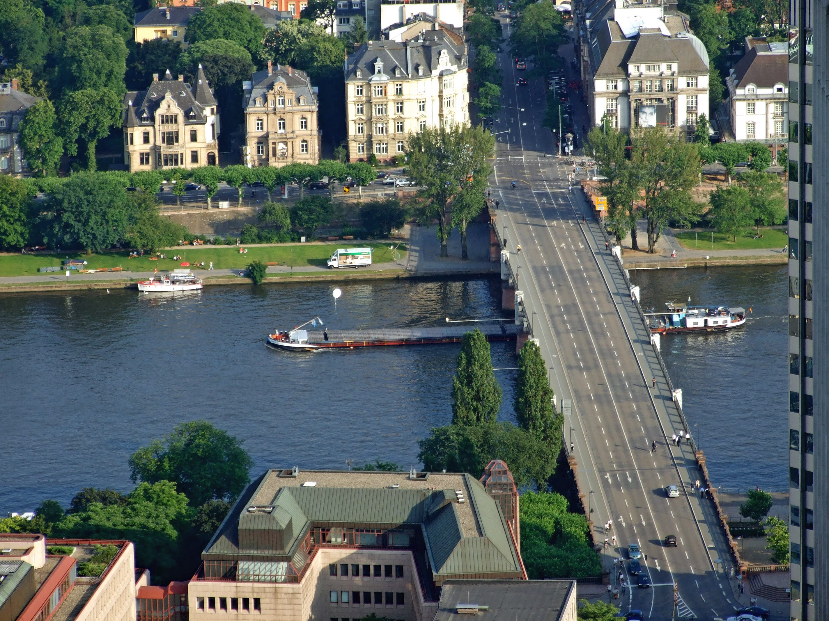 Untermainbruecke geht zur Schweizer Strasse in Sachsenhausen, quer zum Schaumainkai